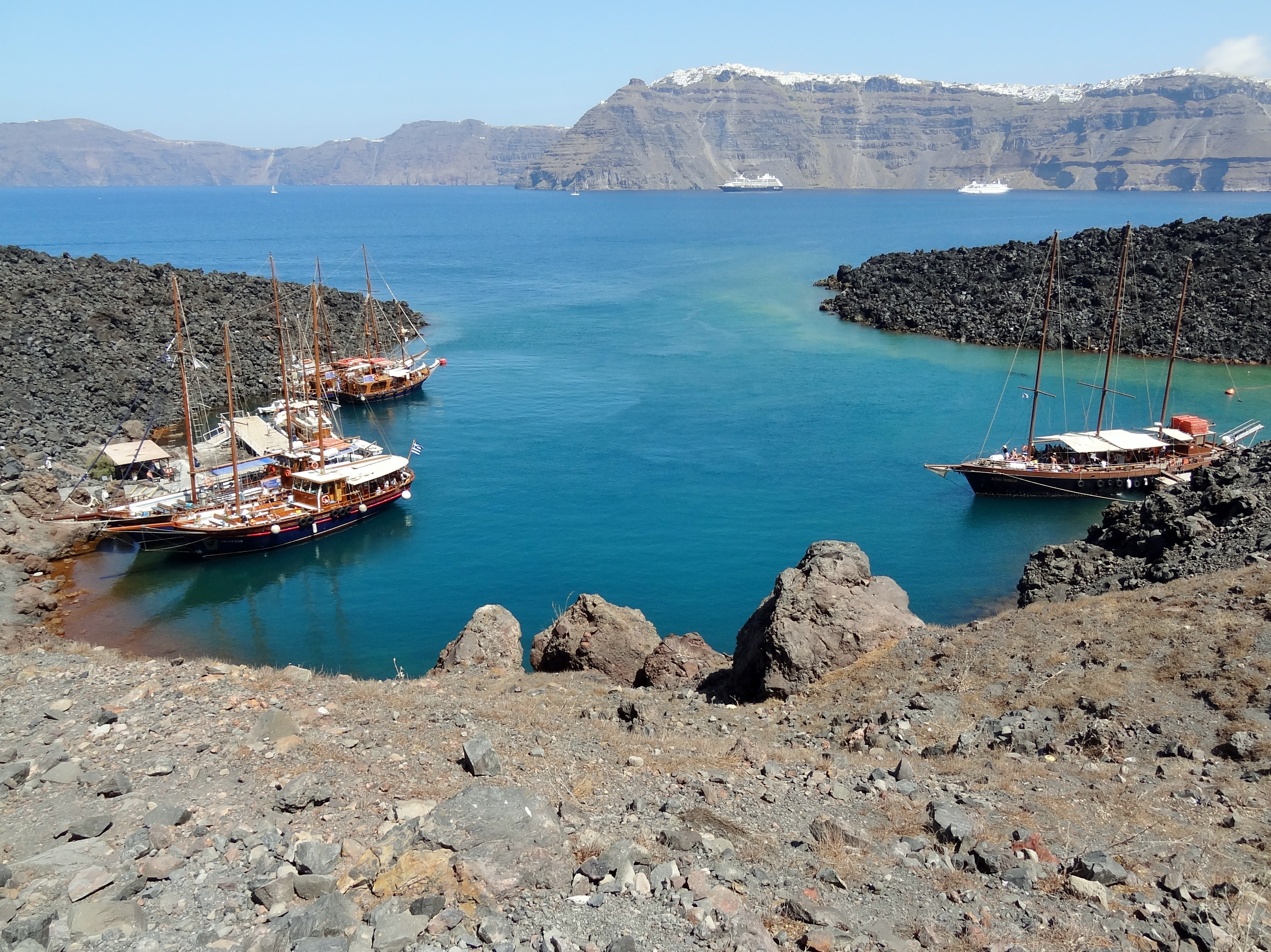 Nordseite der Insel Nea Kameni in der Caldera von Santorin, Kykladen, Griechenland